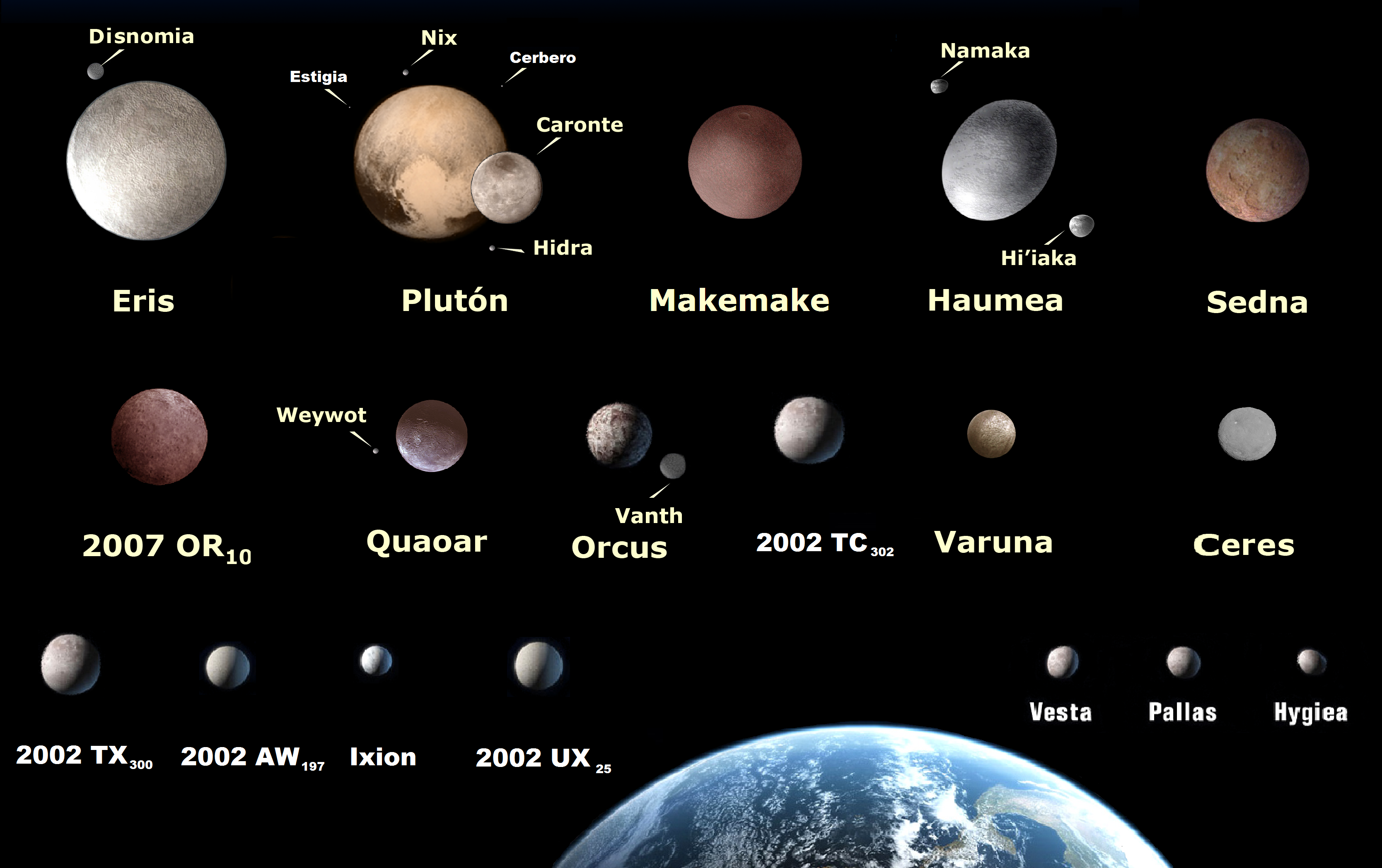 Planetas enanos y candidatos a planeta enano según diversas fuentes, en comparación con el tamaño de la Tierra.